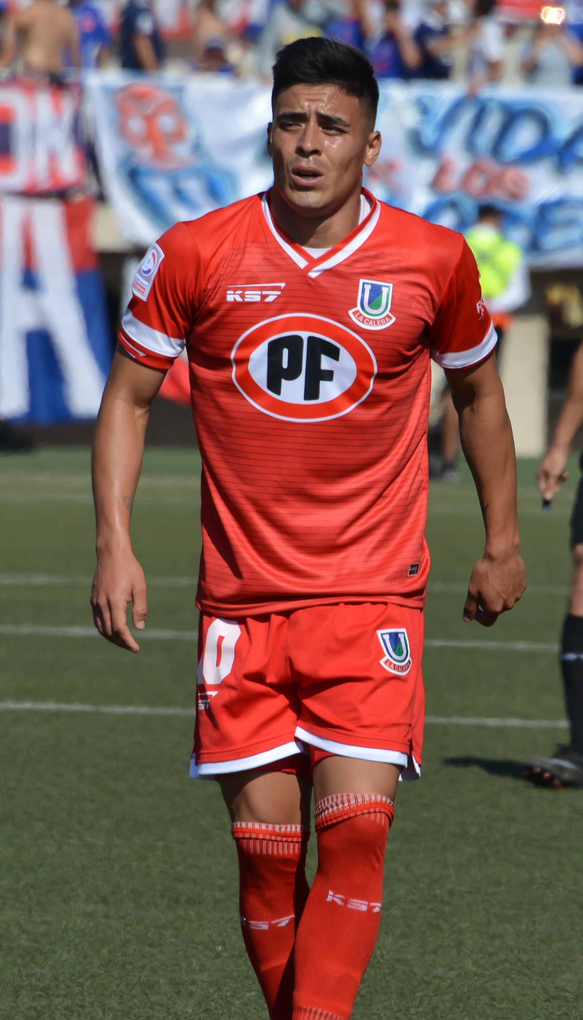 Unión La Calera v Universidad de Chile, Estadio Municipal Lucio Fariña Fernández, Quillota, Chile.